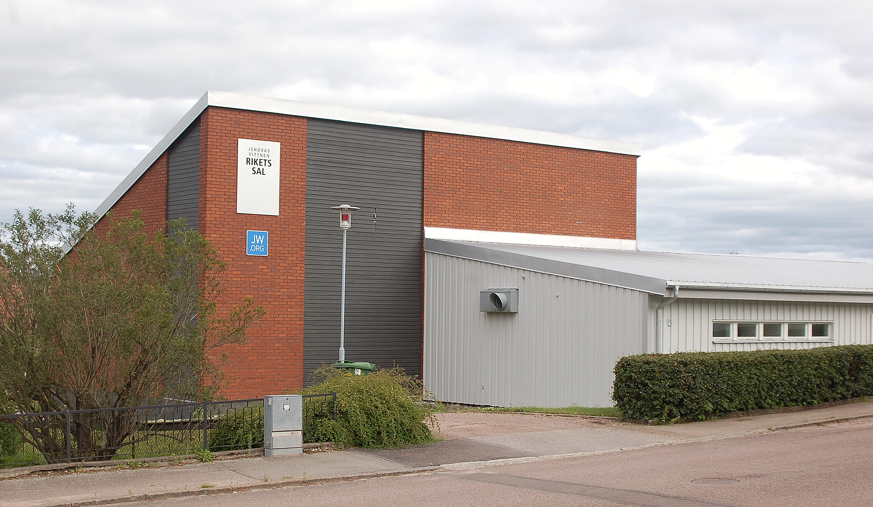 Rikets Sal i Kristinehamn